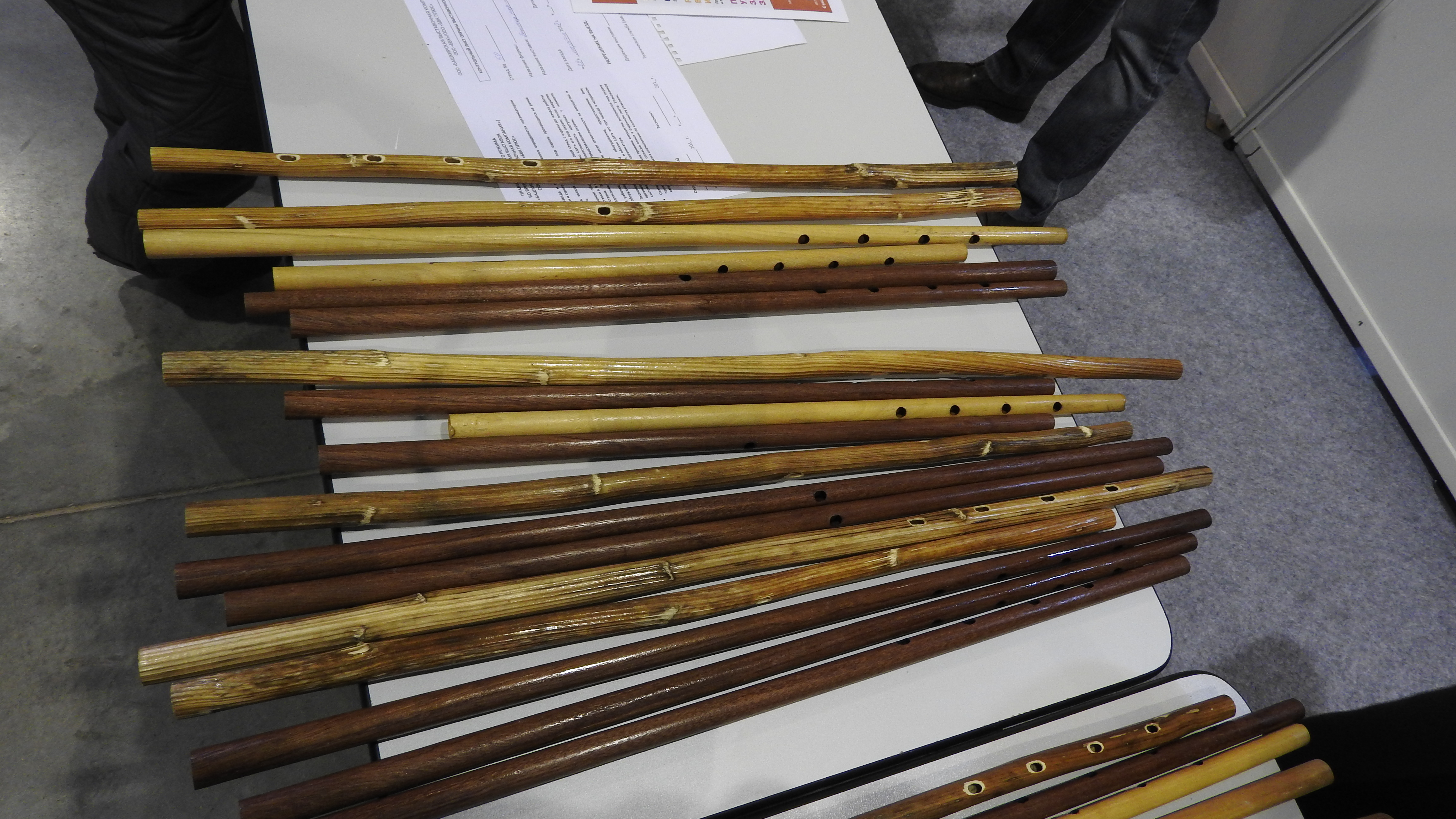 Выставка на ВДНХ ЭКСПО "УФА-ЛАДЬЯ. АРТ.РЕМЕСЛА. СУВЕНИРЫ", Уфа.